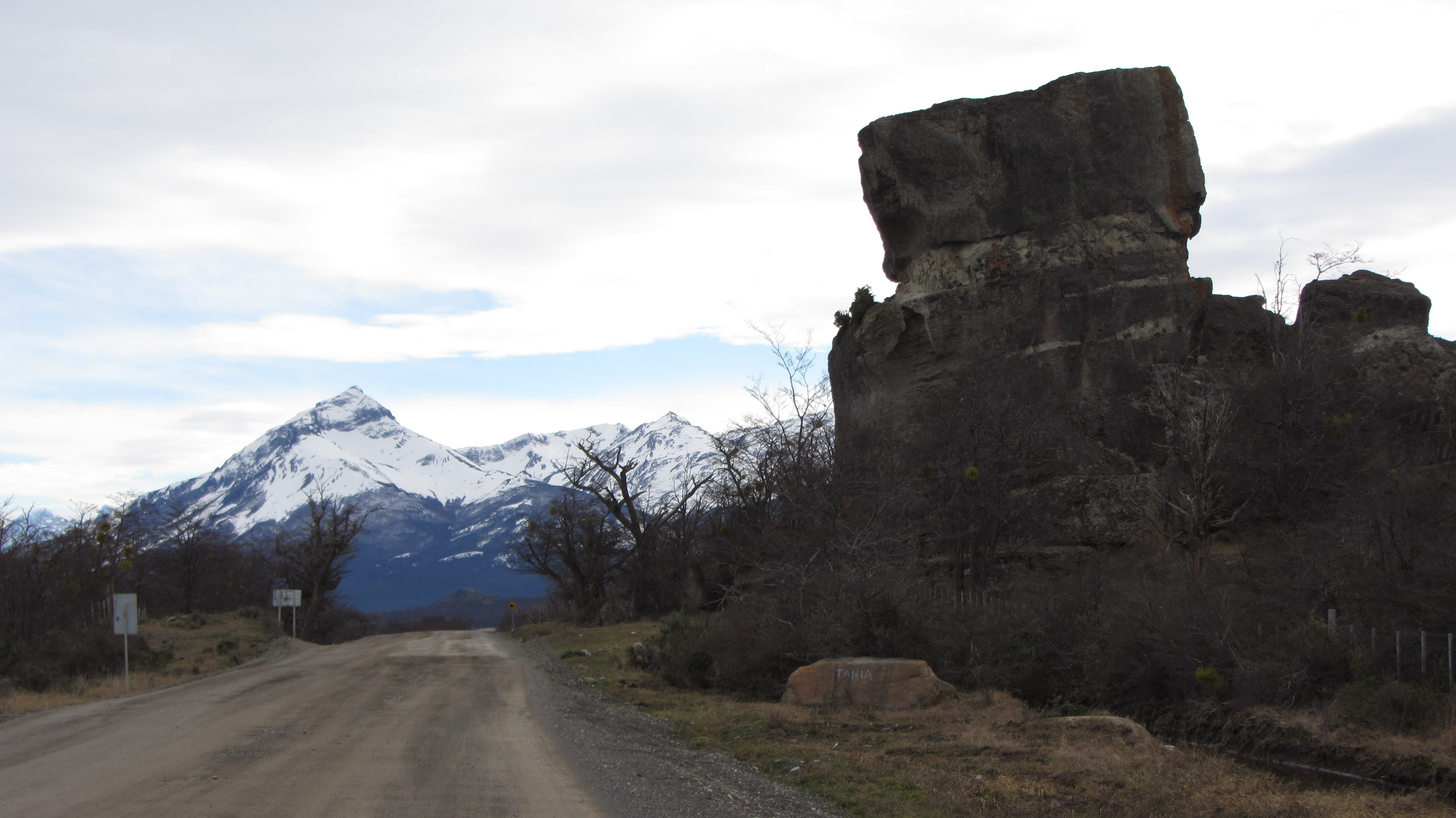 Silla del Diablo Ingreso a Monumento Natural Cueva del Milodón 24 km de Puerto Natales, Provincia de Última Esperanza Magallanes, Chile Agosto de 2012